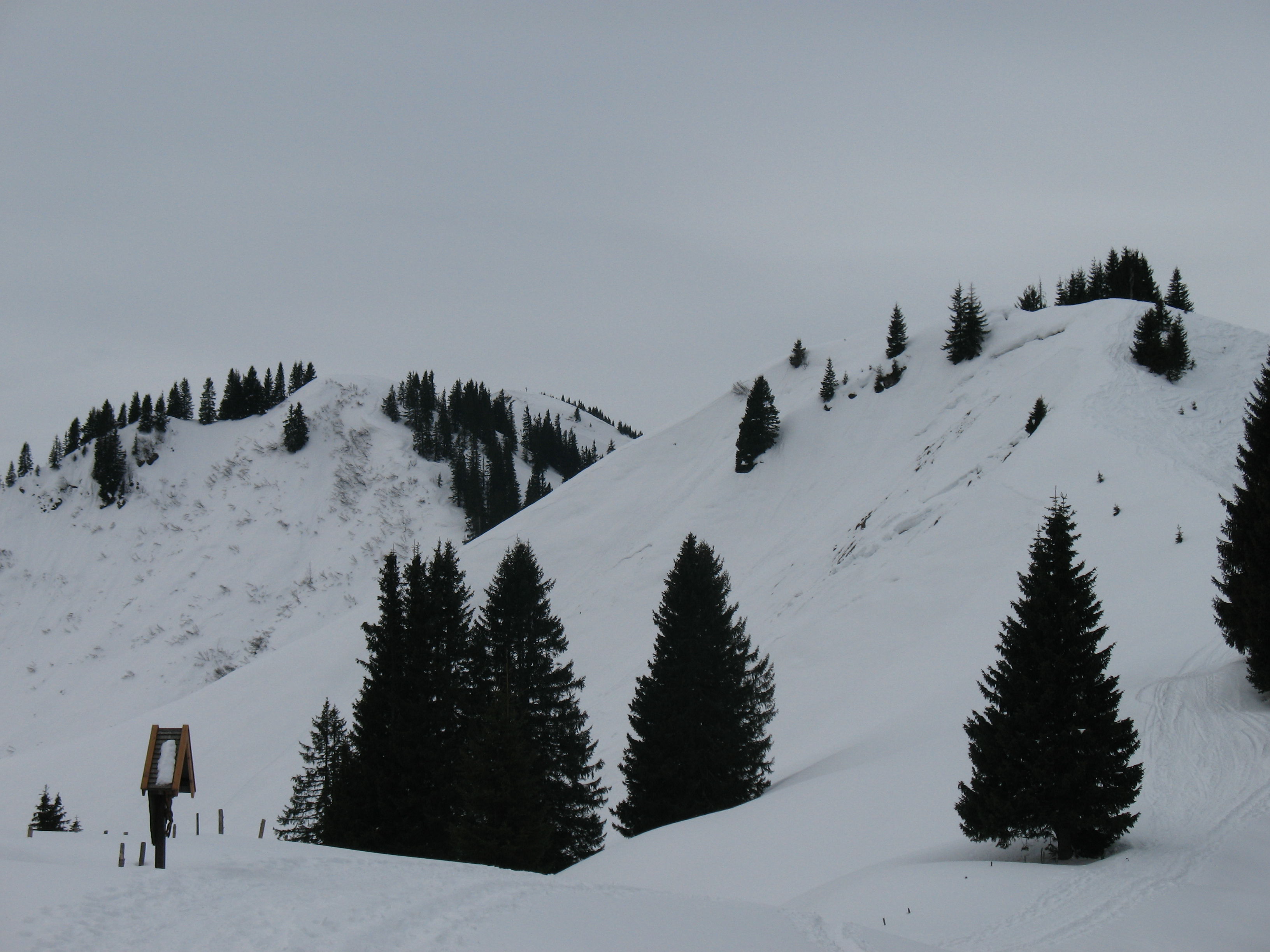 Blick nach Süden auf Sonnenkopf (1712 m) und Heidelbeerkopf (1767 m).